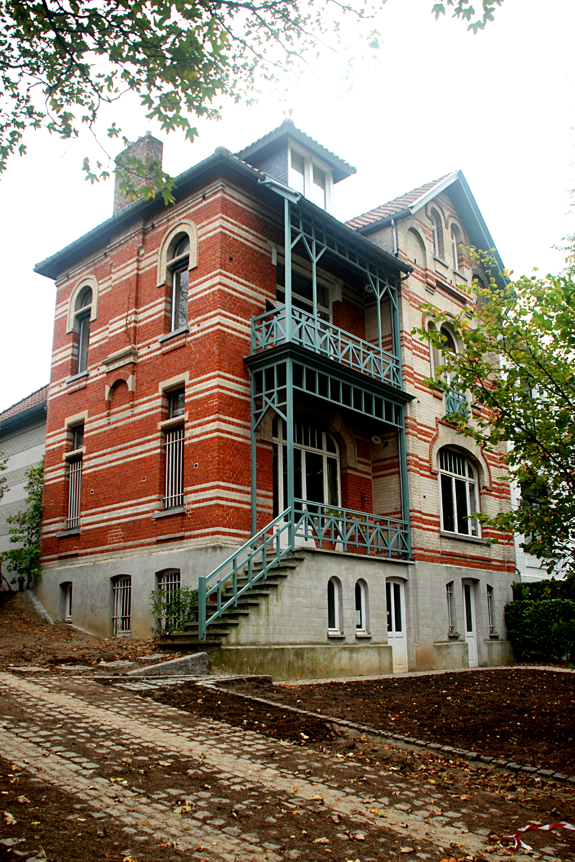 Belgique - Bruxelles - Watermael - William Jelley - Villa Art nouveau - Avenue des Gerfauts 13